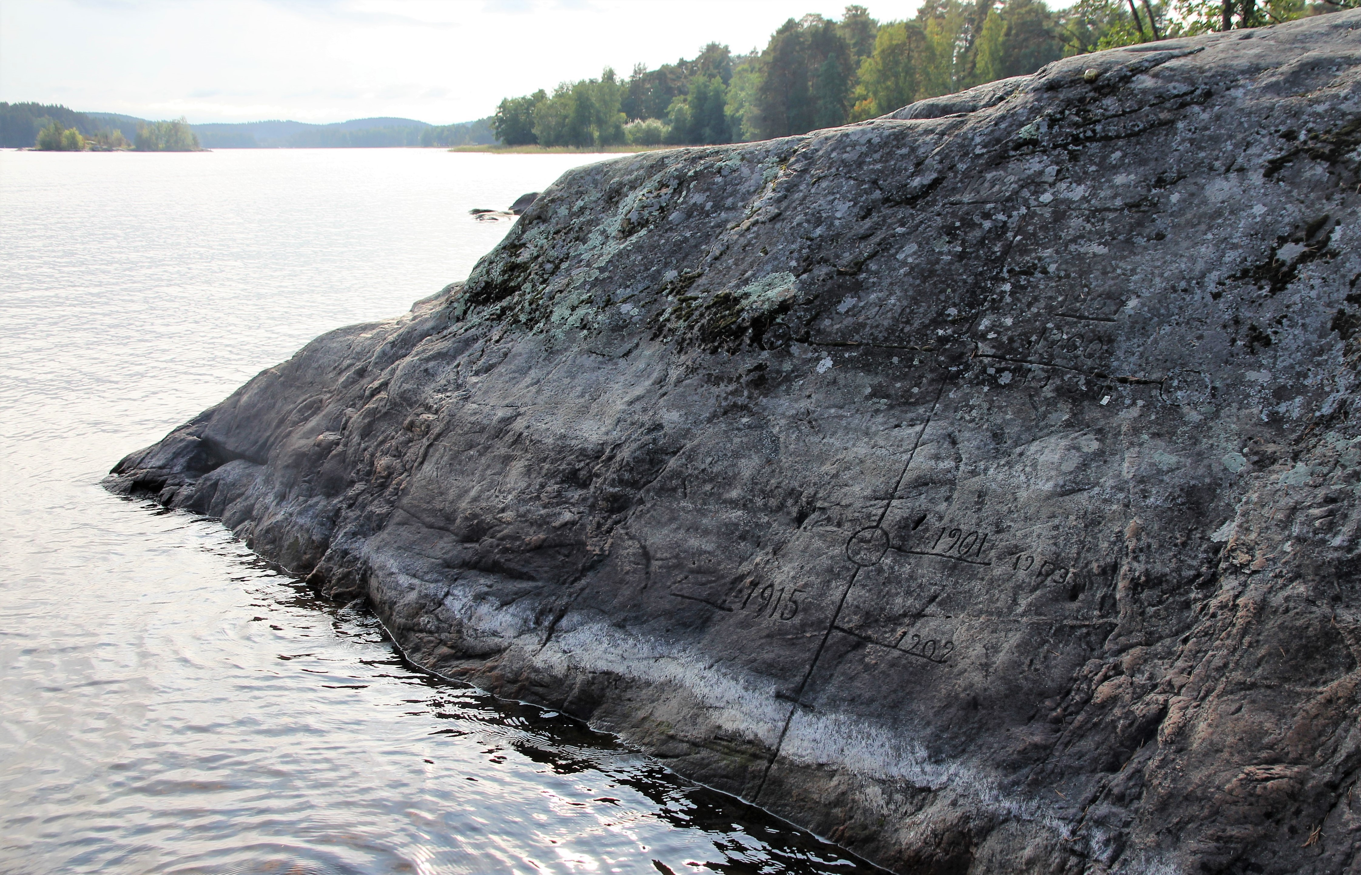 Valapaton viivana tunnettu luonnontieteellinen muistomerkki eli Kallaveden vuoden 1899 tulvahuipun (korkeimman vedenpinnan tason) osoittava, Väinönänniemen rantakallioon Rönönsalmessa hakattu merkintä sen alapuolisine myöhempine lisäyksineen (esim. merkintä vuosilta 1900, 1901, 1903, 1909, 1915) Tämä vesitieteellinen, luonnontieteen historiaan liittyvä muistomerkki sijaistee Väinölänniemen rantakalliossa, Kuopion keskustan kaupunginosiin kuuluvalla Väinölänniemellä. Kuvassa näkyy Kallaveden vedenpinta saman asteikon alapäässä 8.9.2018 iltapäivällä.